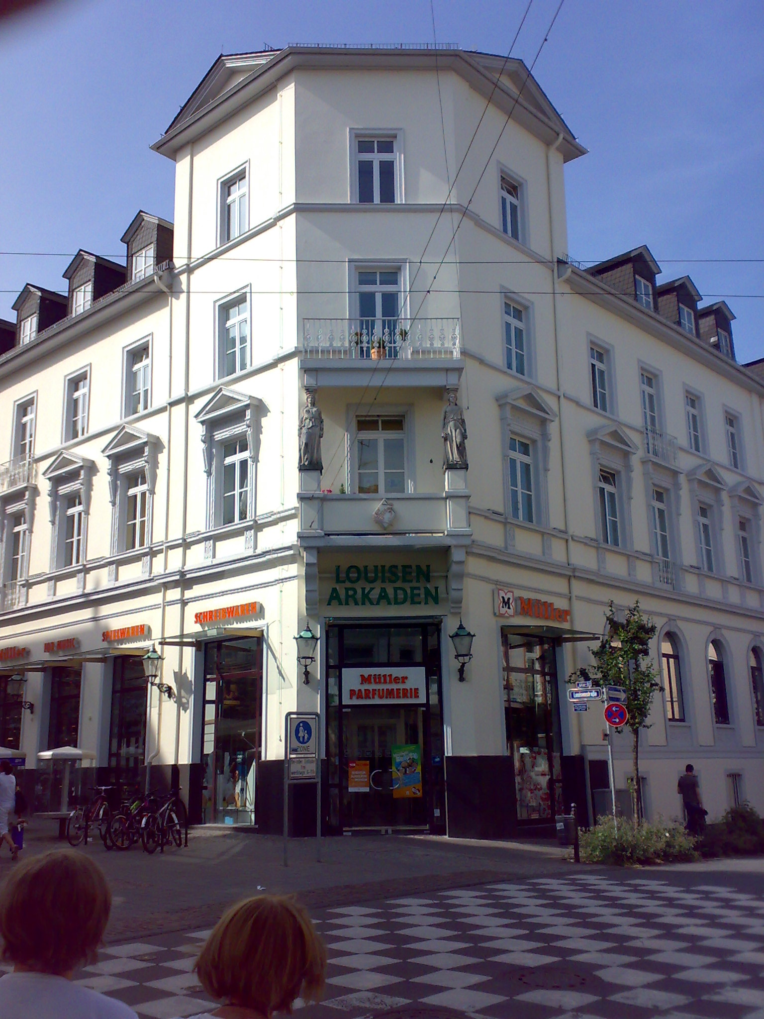 Louisen-Arkaden in Bad Homburg vor der Höhe, Louisenstrasse. Das Gebäude Louisenstrasse 80/82 war ursprünglich das Hotel Augusta und wurde 1916 in die Gustav-Weigand-Stiftung eingebracht und zum Lazarett umgebaut. Bis 1977 diente es als Kurklinik für Kriegsversehrte. Heute beherbergen die Louisen-Arkaden eine Reihe von Fachgeschäften.